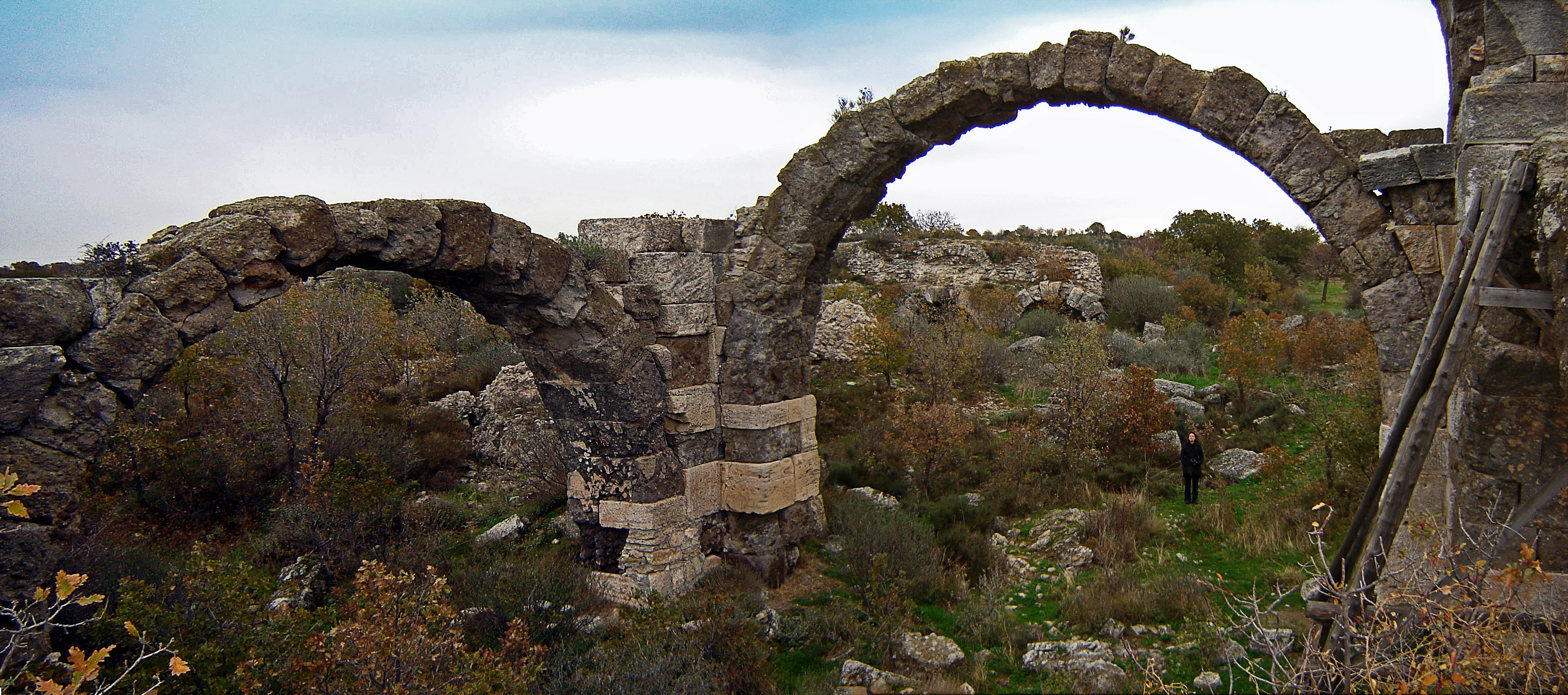 Panorama Therme Alexandria Troas